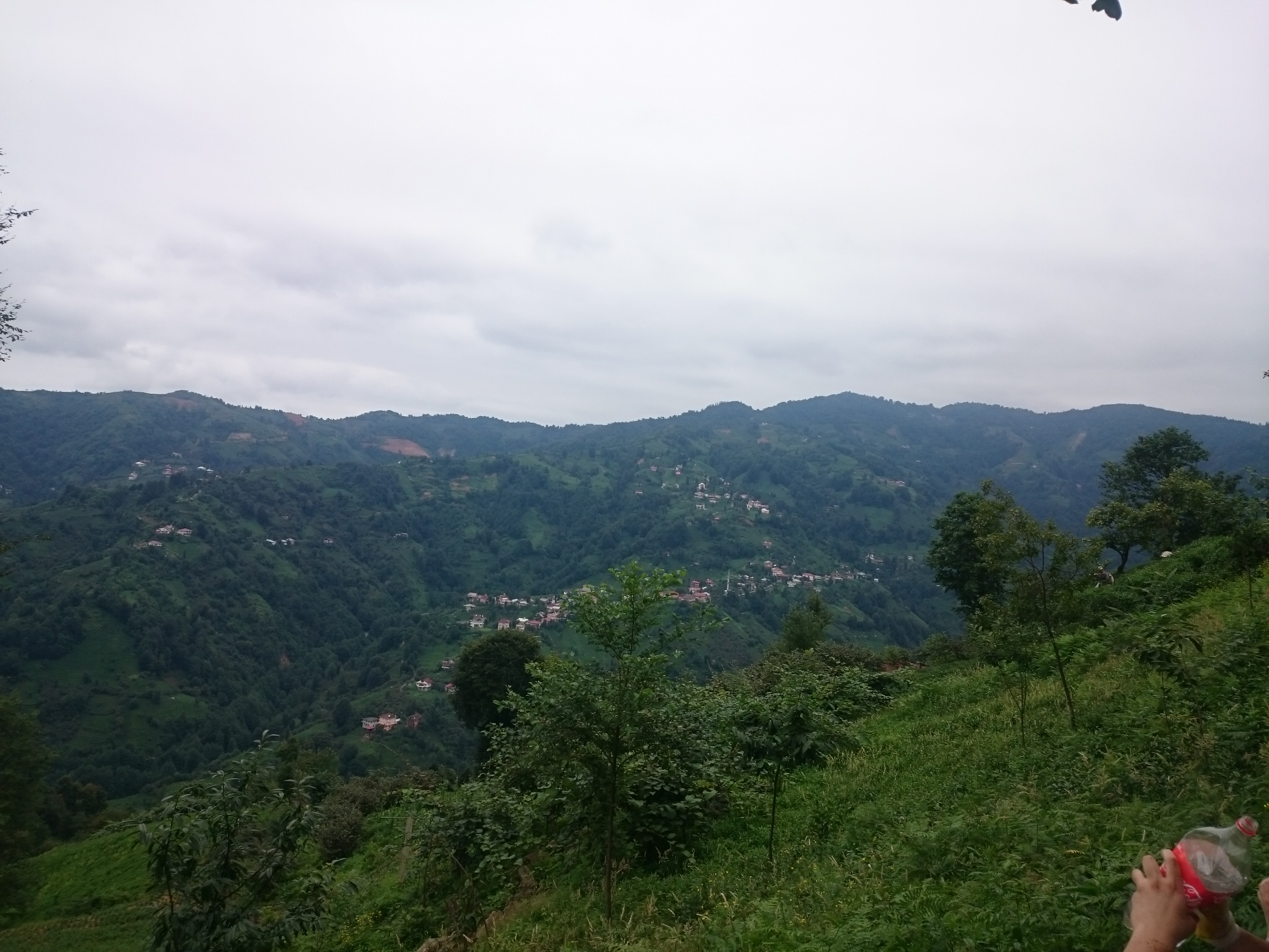 Köyün Tişi3ari mevkisinden bir görüntü